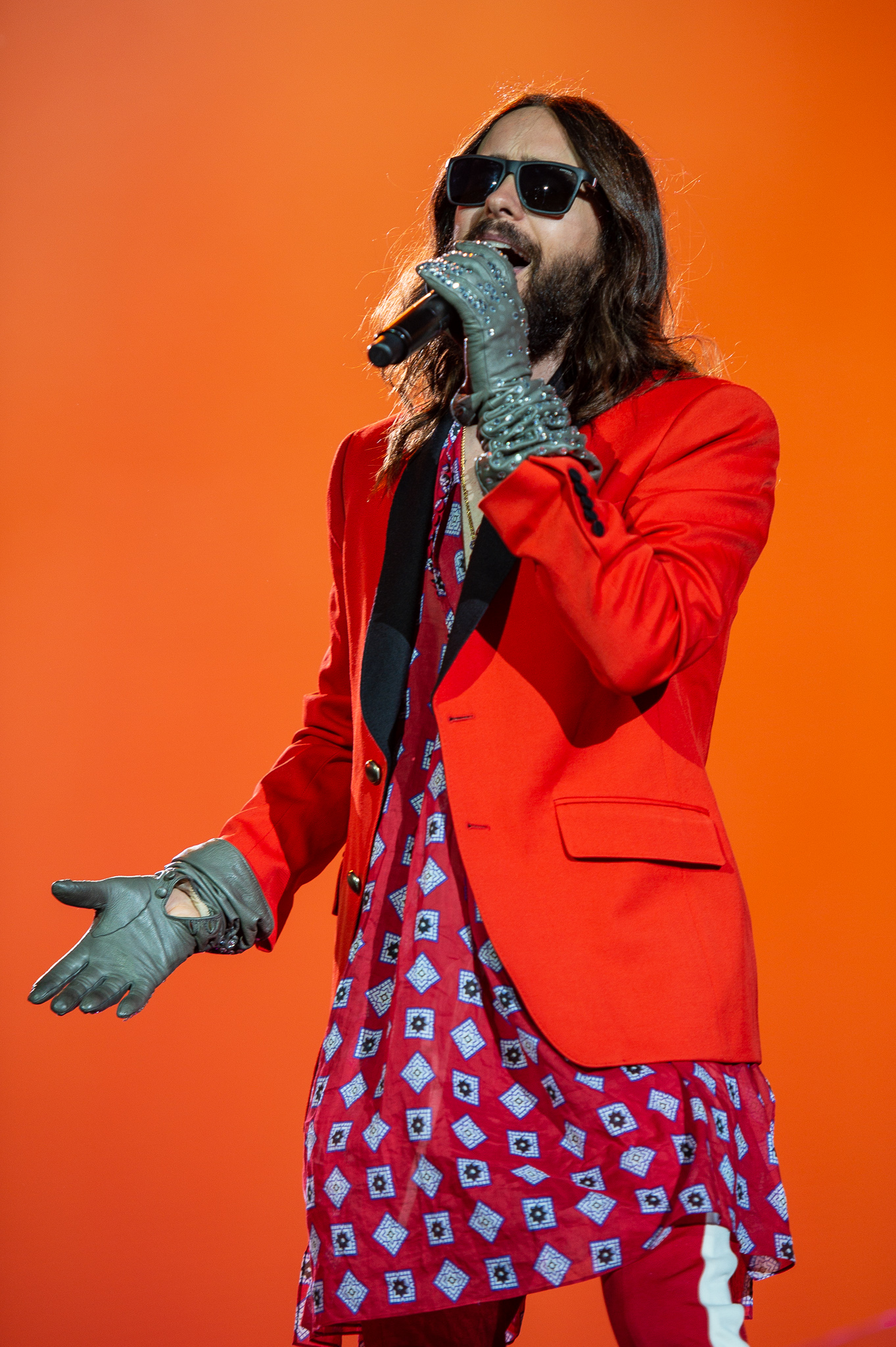 ARGO-Konzerte,Festival,Jared Leto,Konzert,Livekonzert,Livemusik,Musik,RiP,Rock im Park 2018,Thirty Seconds to Mars,Zeppelin Stage